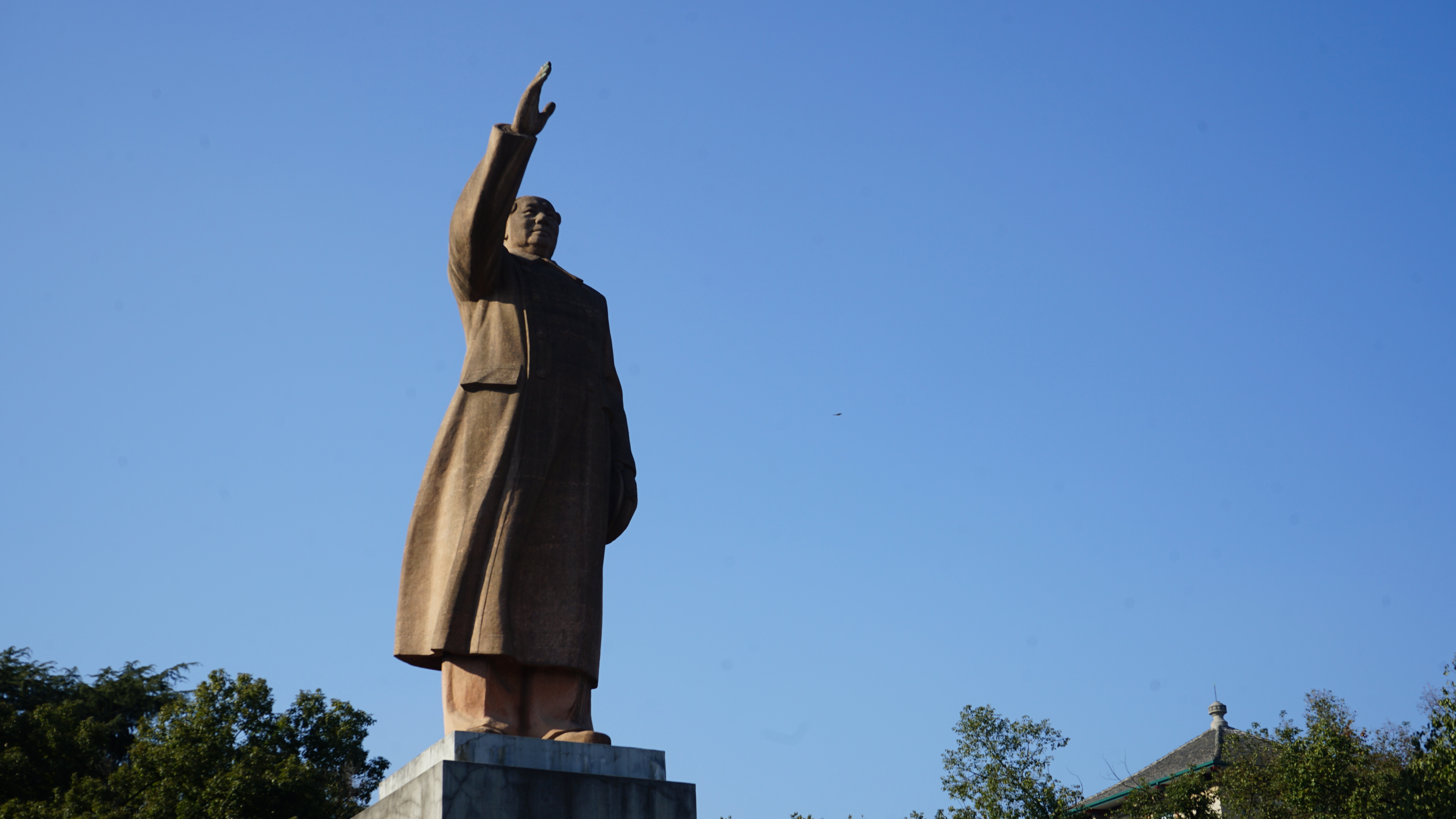 中文（中国大陆）: 浙江大学玉泉校区毛泽东像